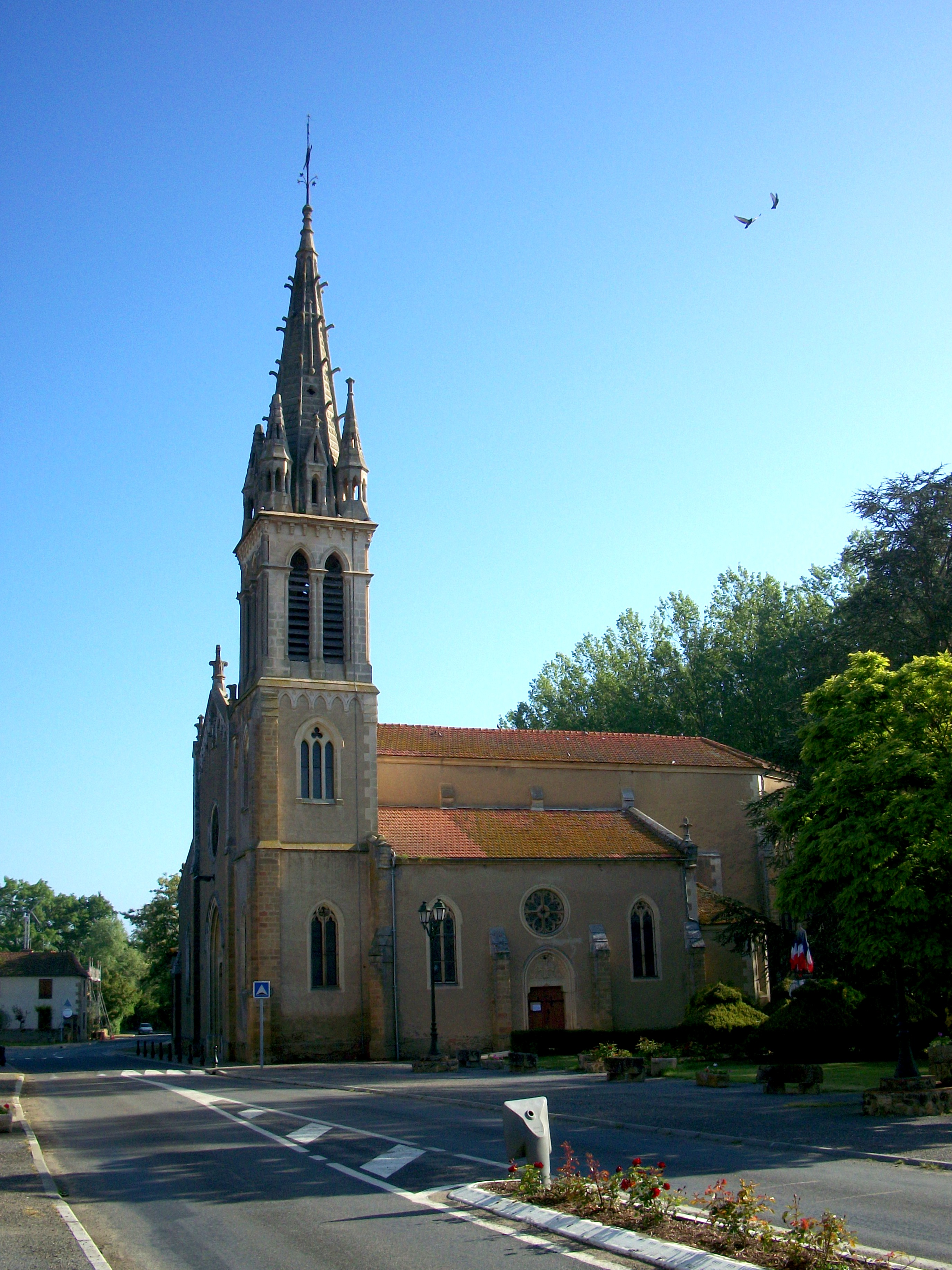 Église de Saint-Michel (Gers, France)